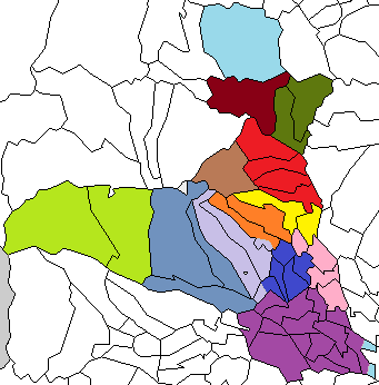 群馬県群馬郡